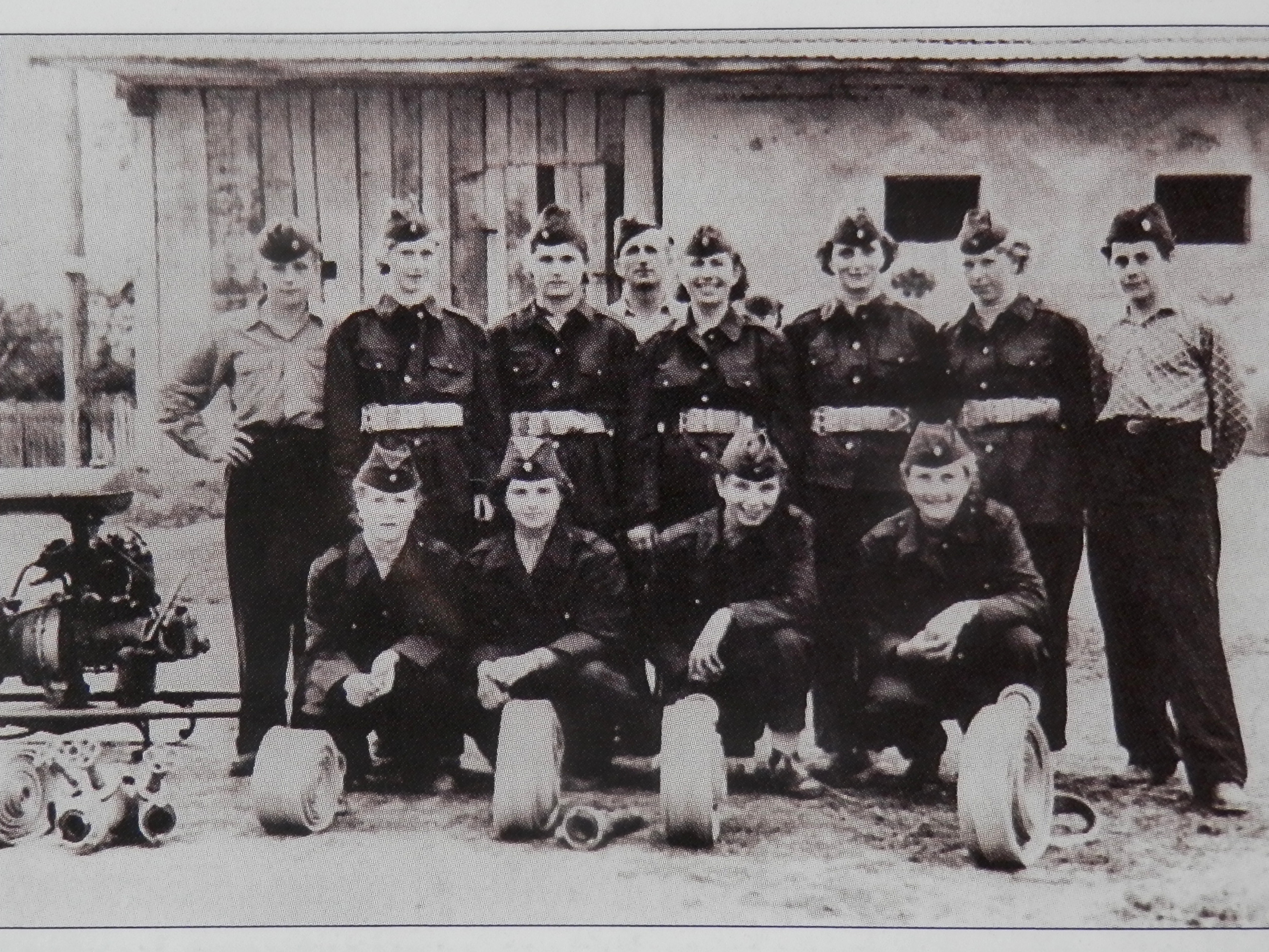 Digitalizácia obrázku z roku 1958. Dobrovoľný ženský hasičský zbor, Požiarničky z obce Sedlice, okres Prešov. Československo.